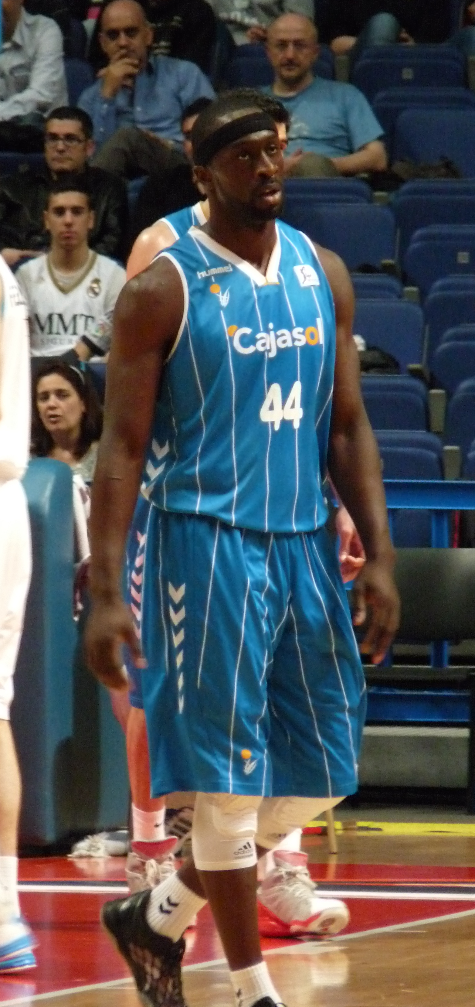 Pops Mensah-Bonsu